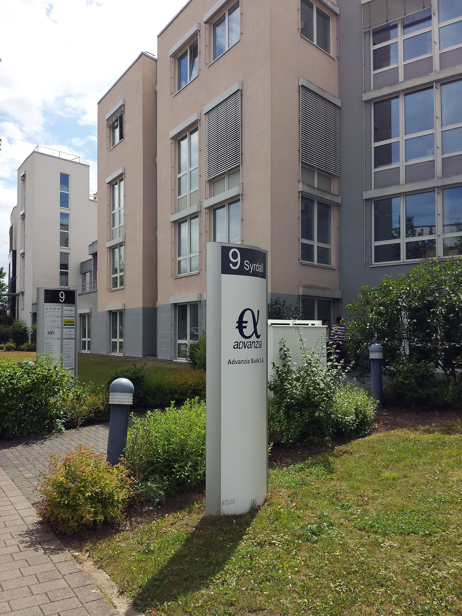 Sitz der Advanzia Bank im Parc d'Activité Syrdall / Zone Industrielle in Munsbach, Luxemburg